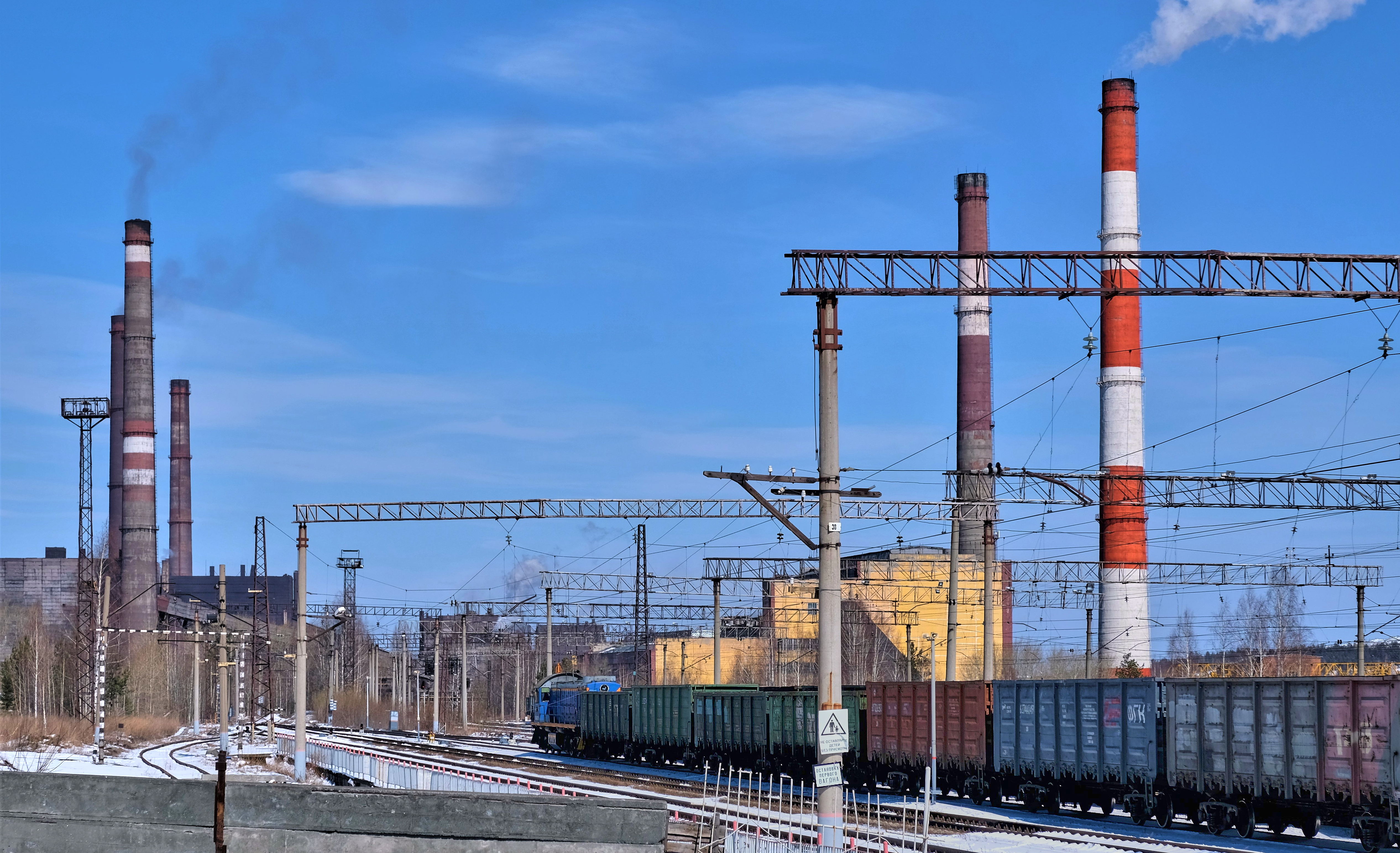 Станция Качканар Свердловской железной дороги